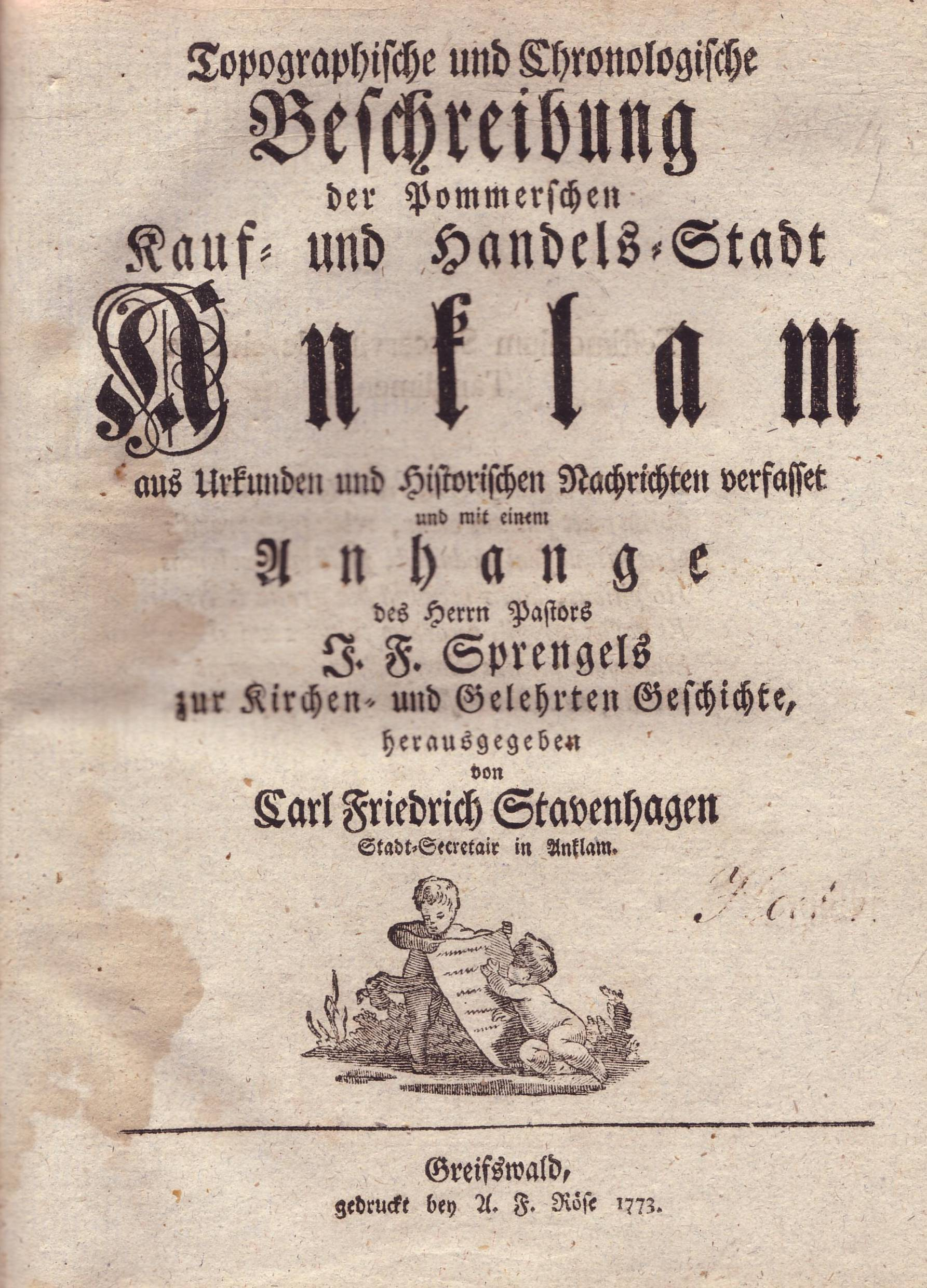 Titelblatt des „Topographische und Chronologische Beschreibung der Pommerschen Kauf- und Handels-Stadt Anklam aus Urkunden und historischen Nachrichten verfasstet und mit einem Anhange des Pastors I. F. Sprengels zur Kirchen- und Gelehrten Geschichte herausgegeben von Carl Friedrich Stavenhagen Stadt-Secretair in Anklam Greifswald, gedruckt bei U. F. Köse 1773.“